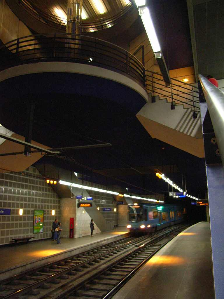 metro, gare-rue verte, Rouen, Fr